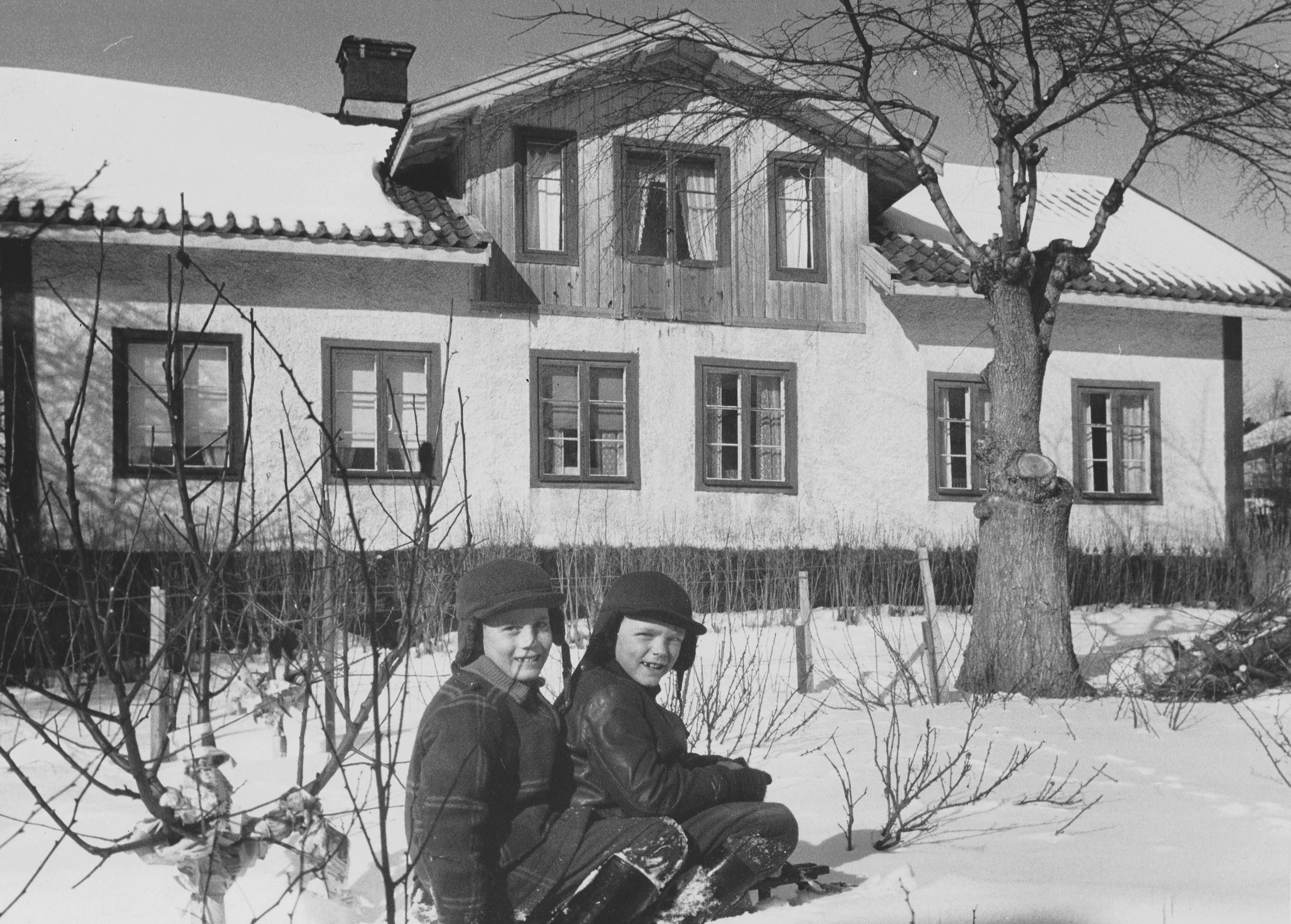 Eklundska gården. Den tillhörde den äldsta bebyggelsen i Sköndal.